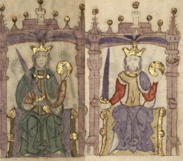 Iluminura de Fernando II de Leão e Afonso I de Portugal